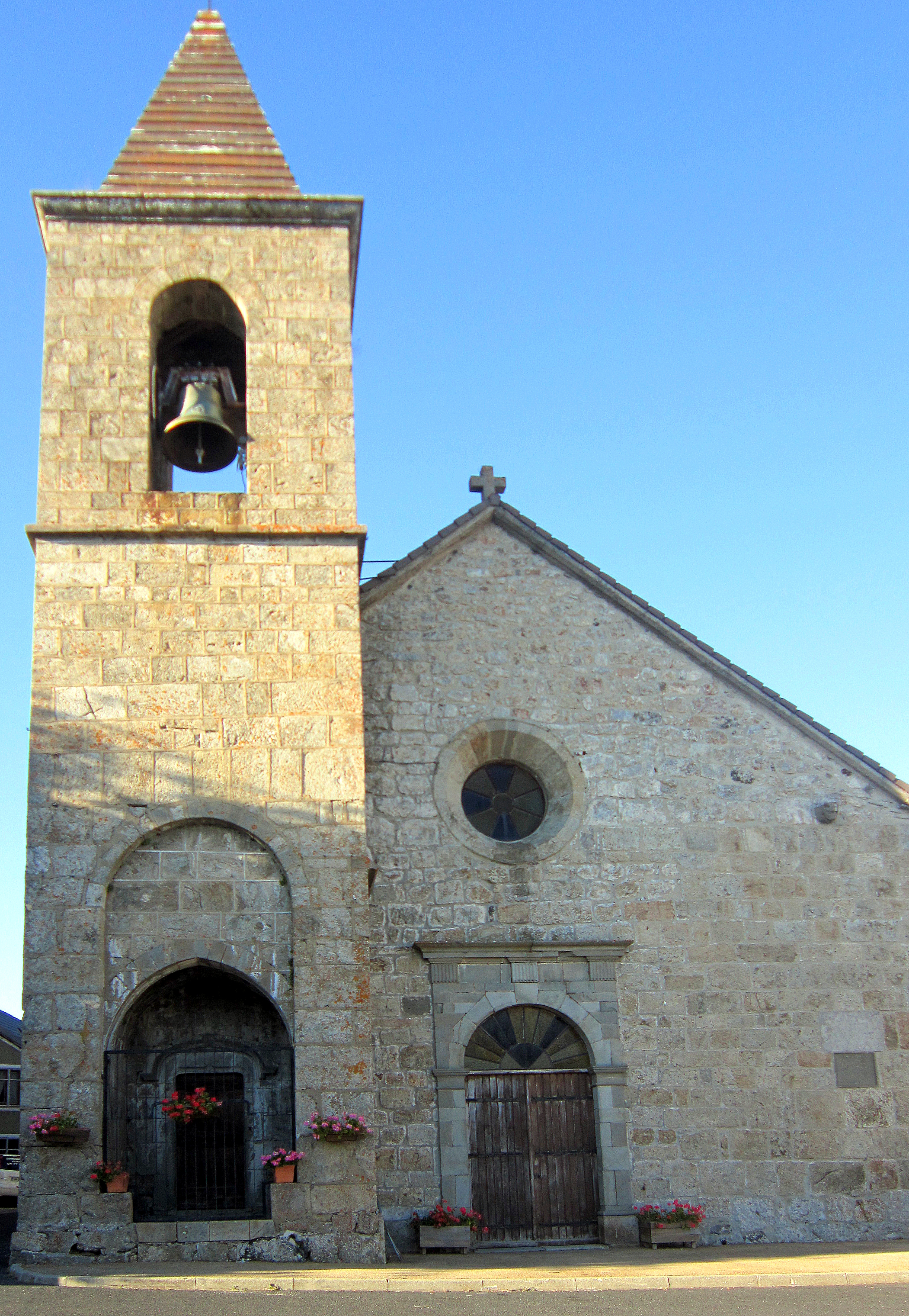 Eglise de Sainte Eulalie, Haute Ardèche